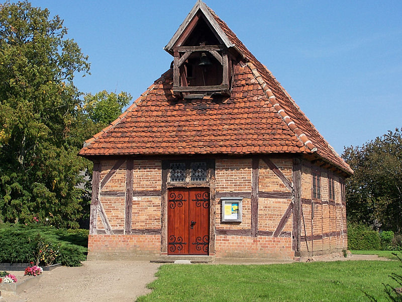 Kirche in Passin, Mecklenburg-Vorpommern